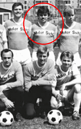 Title: Mannschaftsfoto BSG Motor Suhl Factual corrections and alternative descriptions are encouraged separately from the original description. Additionally errors can be reported at this page to inform the Bundesarchiv. Original historic description: ADN-ZB Schaar 16.6.84 Suhl: Aufsteiger zur Fußball-Oberliga 1984-85: BSG Motor Suhl. Einen Spieltag vor Abschluß der Aufstiegsrunde sicherte sich die BSG Motor Suhl einen der beiden freien Plätze in der Fußball-Oberliga. Die Thüringer spielen damit in der nächsten Serie erstmals in der höchsten DDR-Fußballklasse. Hintere Reihe v.l.n.r.: Trainer Paul Kersten, Wolfgang Reuter, Peter Staps, Hartmut Weiß, Andreas Böhm, Roman Seyfarth, Andreas Schneider, Dieter Kurth, Klaus Schröder, Matthias Brückner, Erhard Mosert, Gerd Schellhase, Mannschaftsleiter Frank Hoffmann und Trainer Ernst Kurth. Vordere Reihe v.l.n.r.: Masseur Peter Eichelbrenner, Klaus Semineth, Dieter Erhardt, Jürgen Schneider, Torhüter Walter Jänicke, Torhüter Klaus Müller, Ralf Eismann, Uwe Jertschewski, Uwe Trömel und Trainer Burkhardt Winkler.